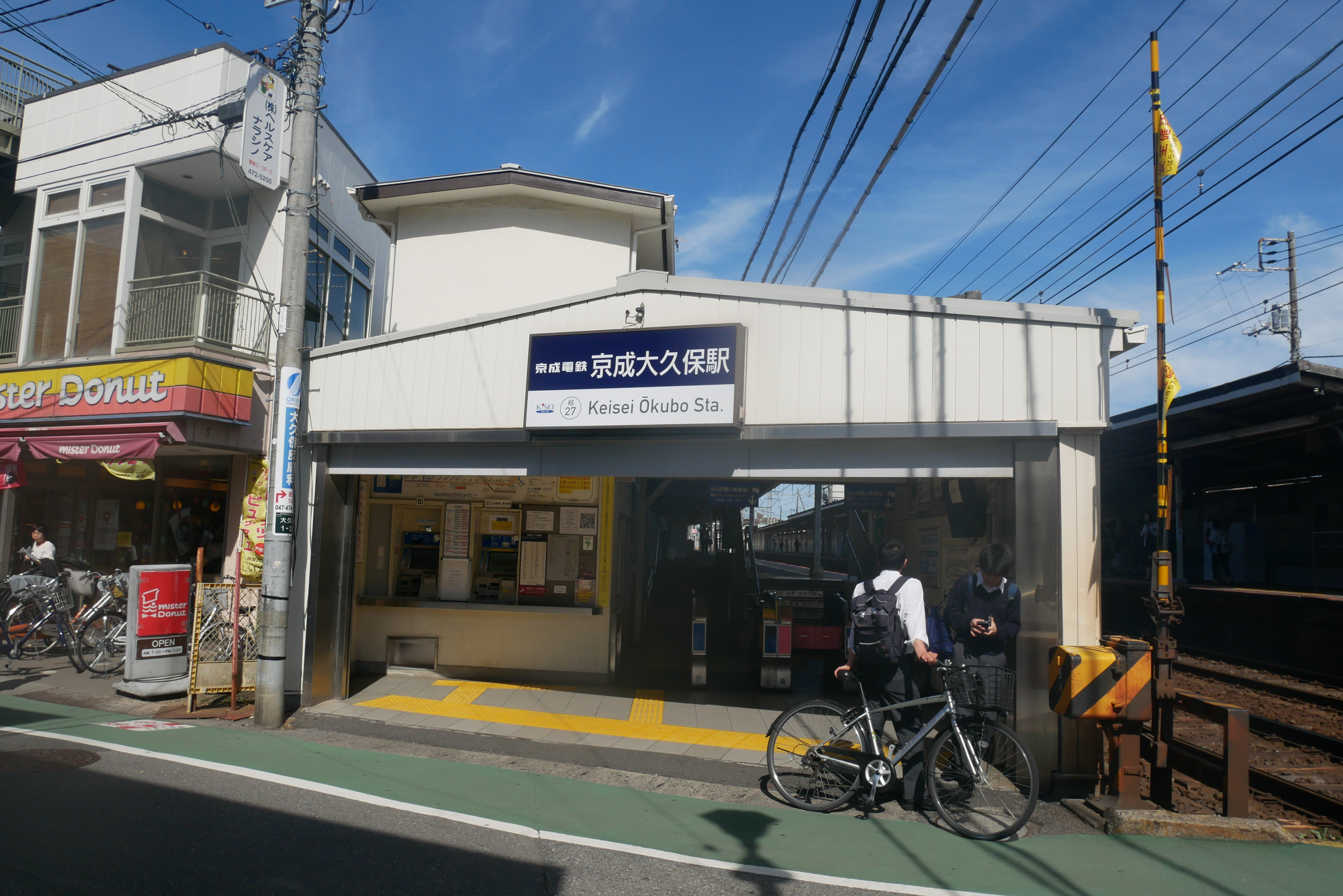 京成大久保駅 (Keisei-Ōkubo Station)